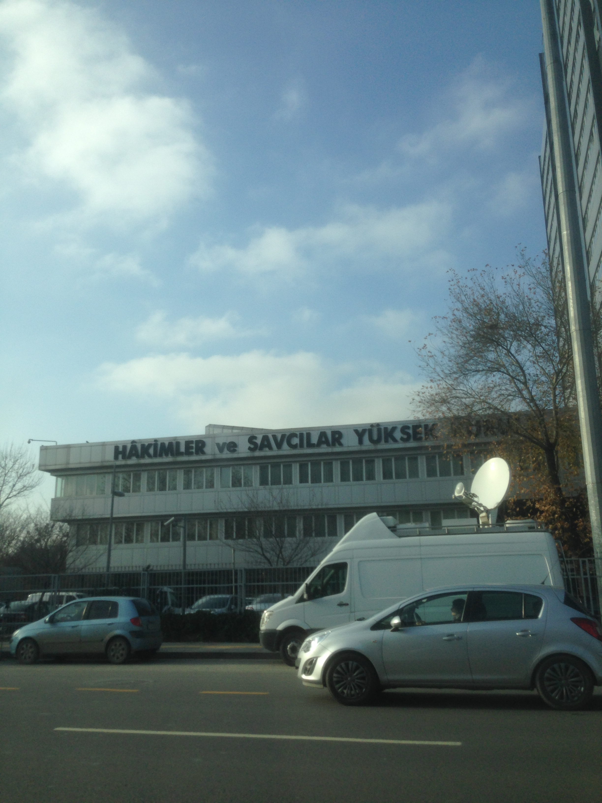 Ankara'dan çeşitli görüntüler